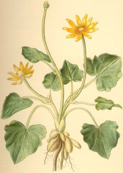 Ficaria verna subsp. bulbilifera